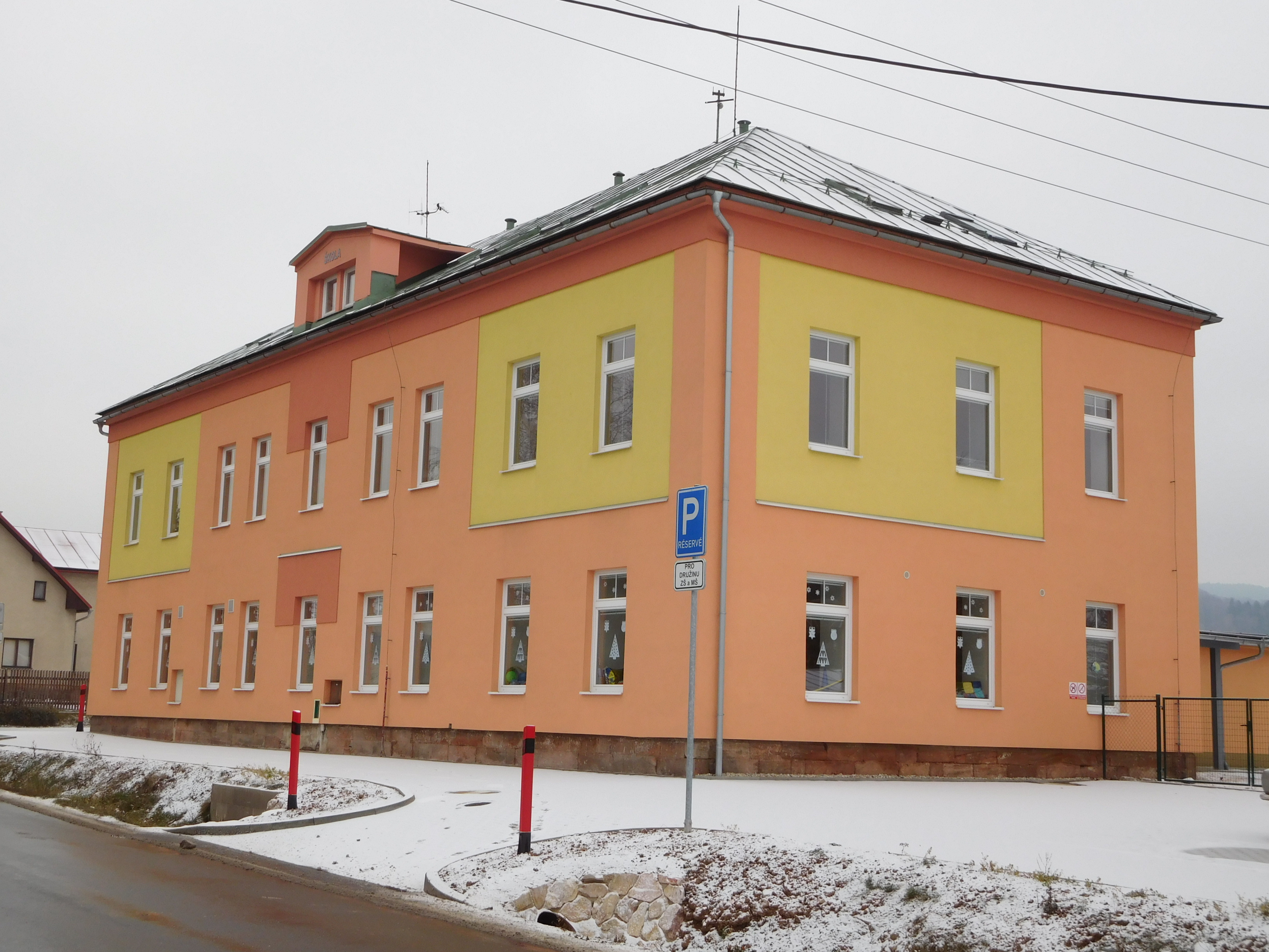 Lánov 121 - základní škola